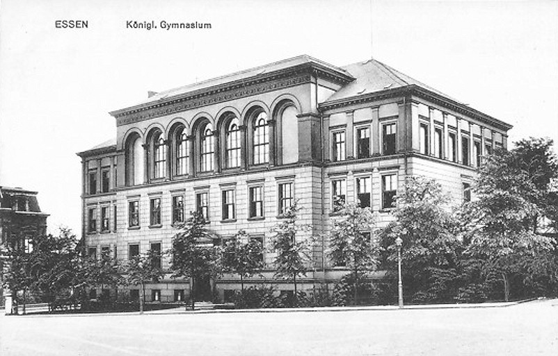 Gebäude des Königl. Gymnasiums am Burgplatz in Essen, errichtet ca. 180-1882, Vorgänger des heutigen Burggymnasiums